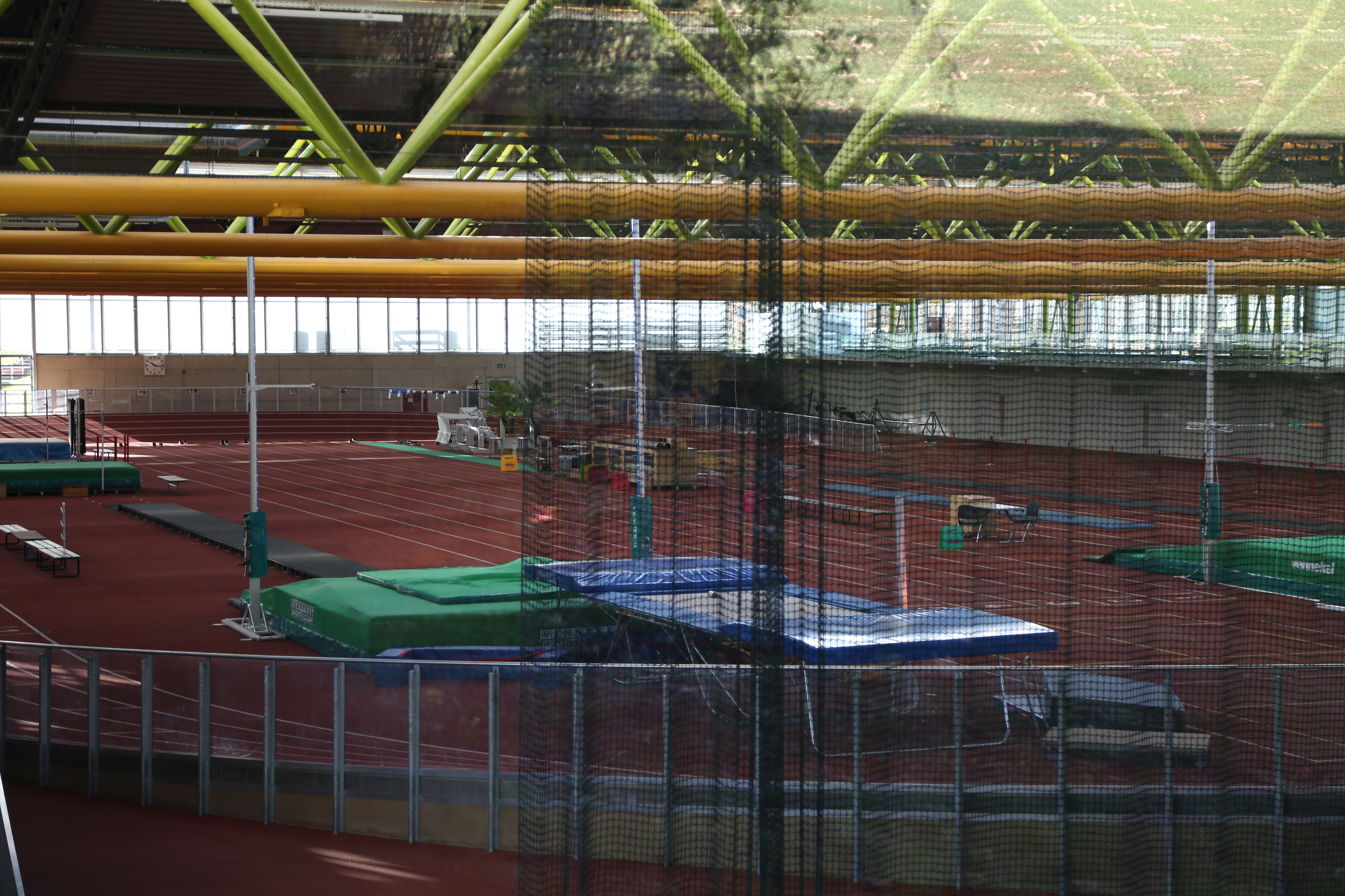 Olympiastützpunkt Bayern im Münchner Olympiastadion. Werner-von-Linde-Halle, die Trainingshalle des Stützpunkts